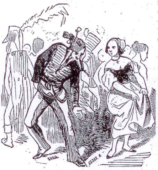 Danseurs du Carnaval de Paris.